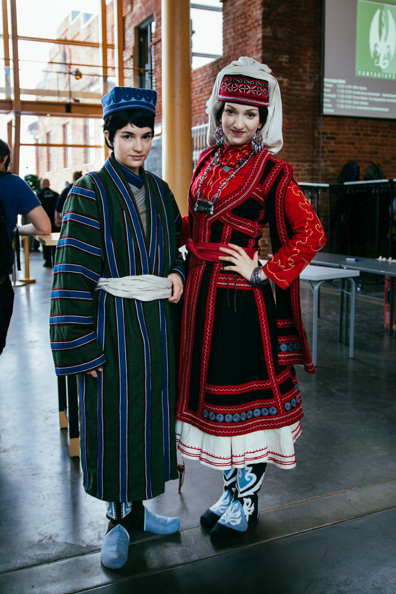 Desucon Frostbite 2014